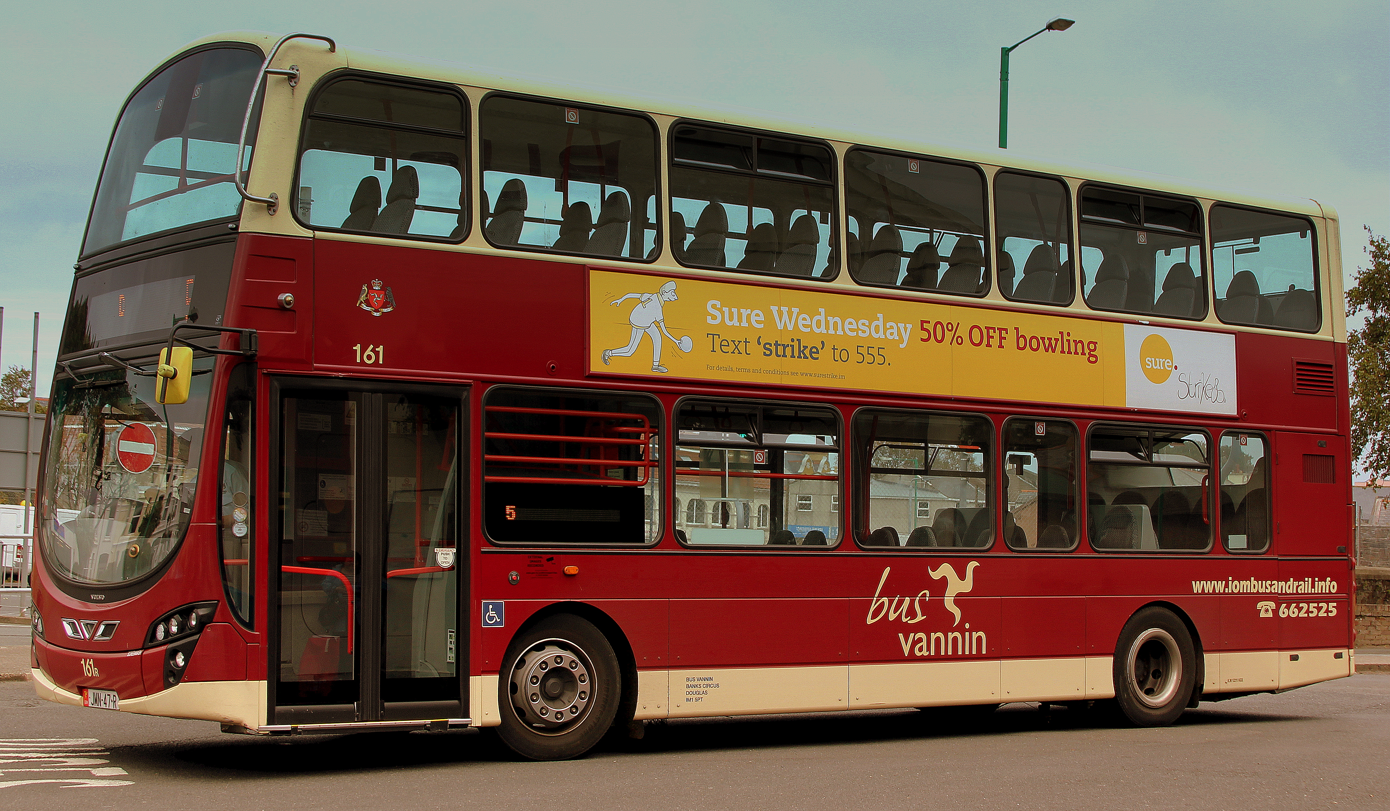 BUS VANNIN WRIGHTBUS GEMINI 2 AT RAMSEY BUS STATION ISLE OF MAN SEP 2014